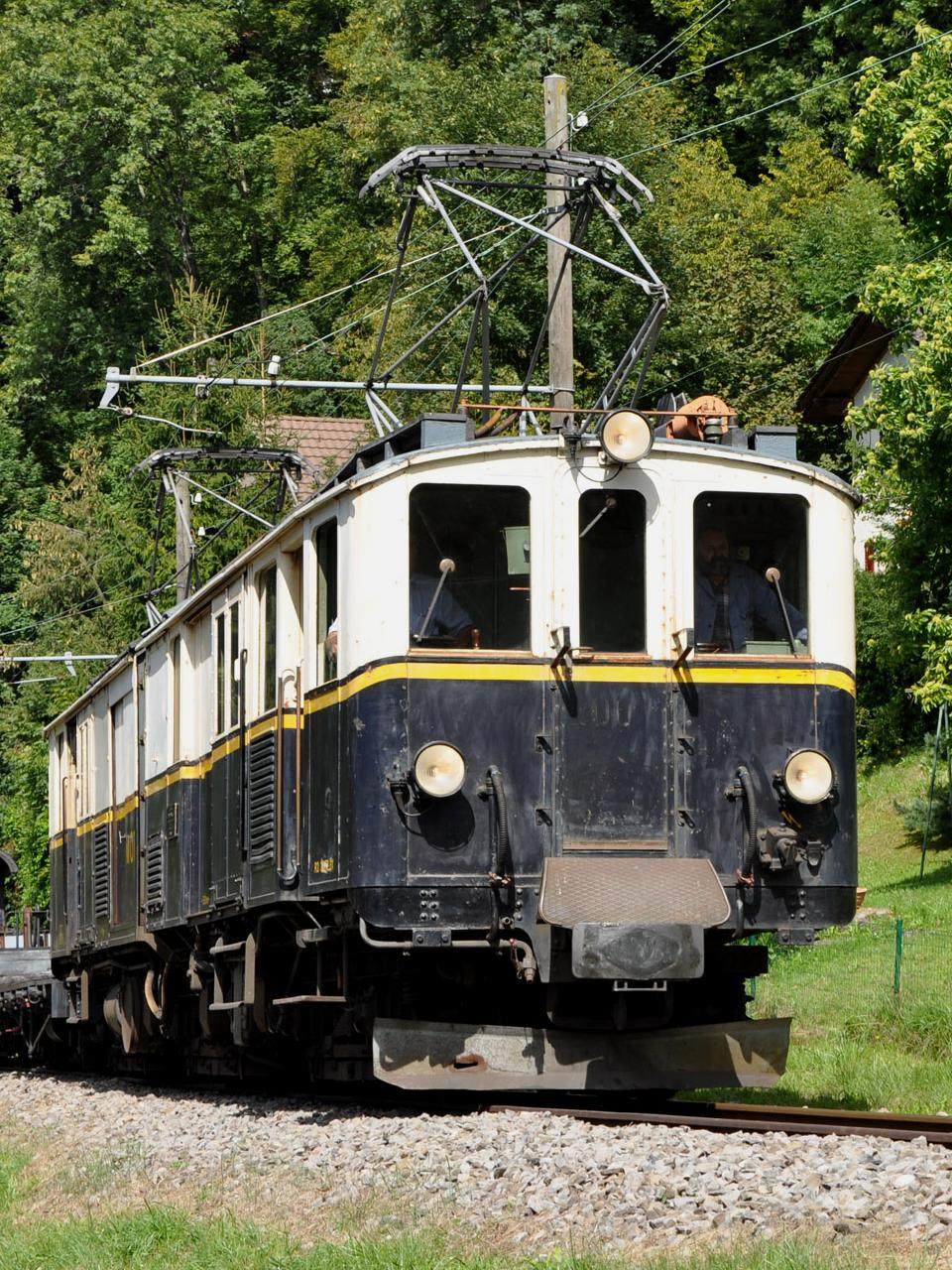 Historischer Gepäck- und Posttriebwagen FZe 6/6 2002 der Montreux-Berner Oberland-Bahn (MOB) bei der Museumsbahn Blonay–Chamby.